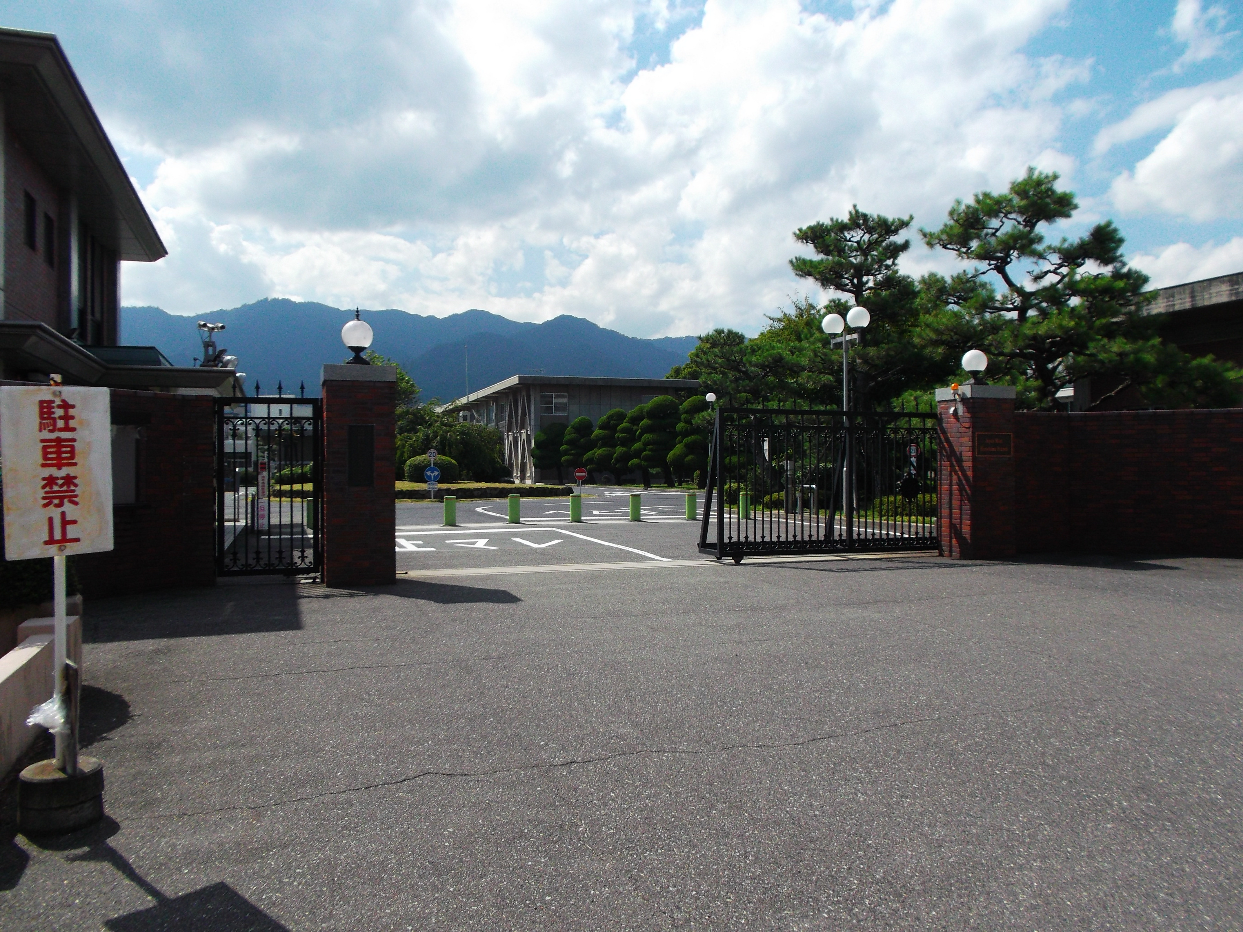 造幣局広島支局